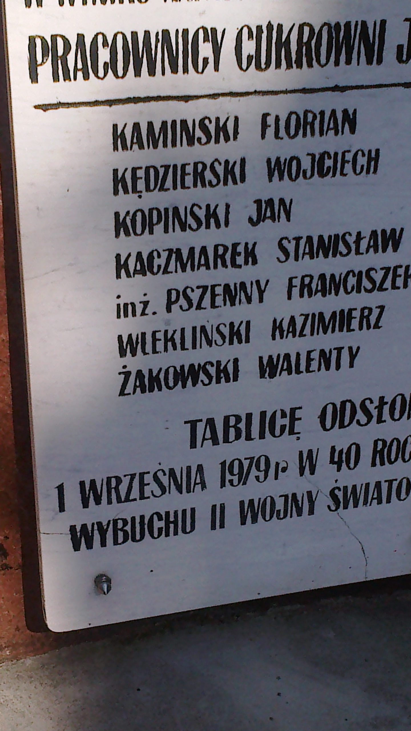 Pomnik w Janikowie